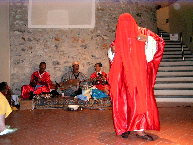 Rituale Lila, Confraternita Gnawa du Maroc, Maâlem Abdenbi Al Gadari Castello d'Albertis, Genova. Foto di Cristina Cassese.